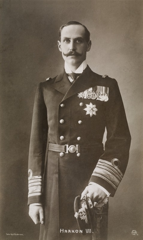 Haakon VII, portrett, mann, konge, uniform, ordener, stående knefigur.